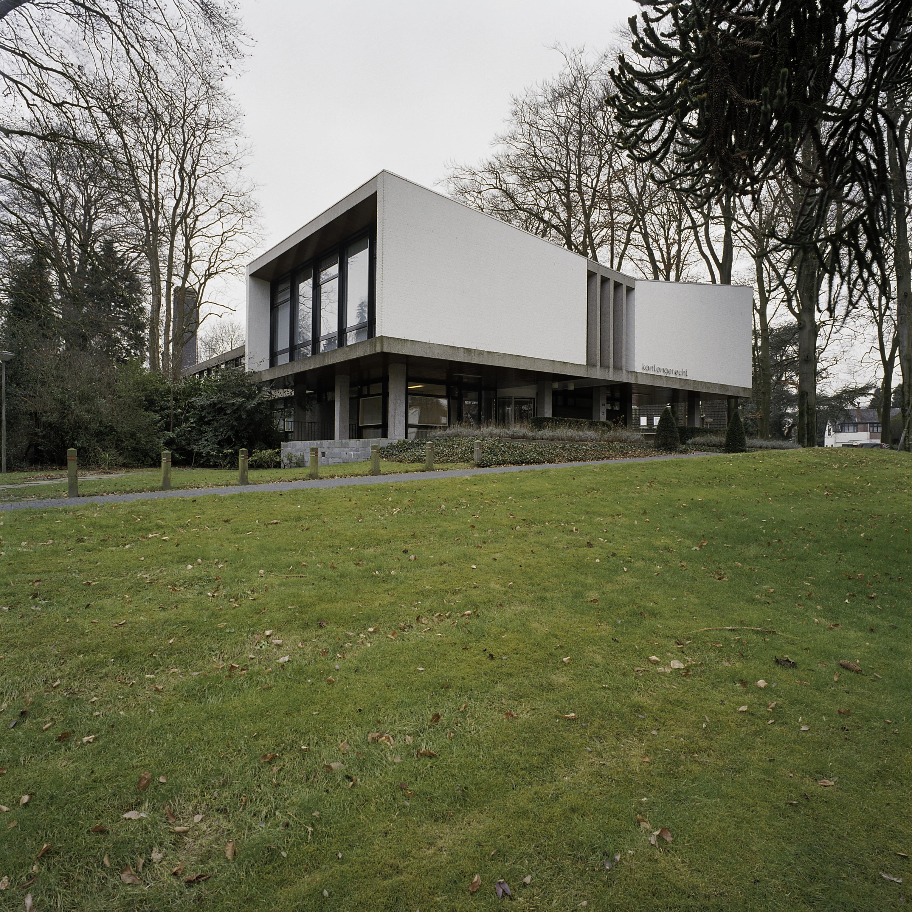 Kantongerecht/ Gerechtsgebouw: Overzicht van de voorgevel met de ingangspartij en van een gedeelte van de linker zijgevel